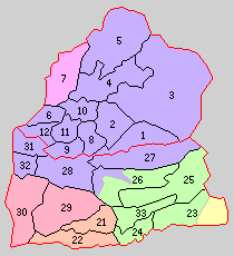 後の熊本県菊池郡域の町村制時点の町村。